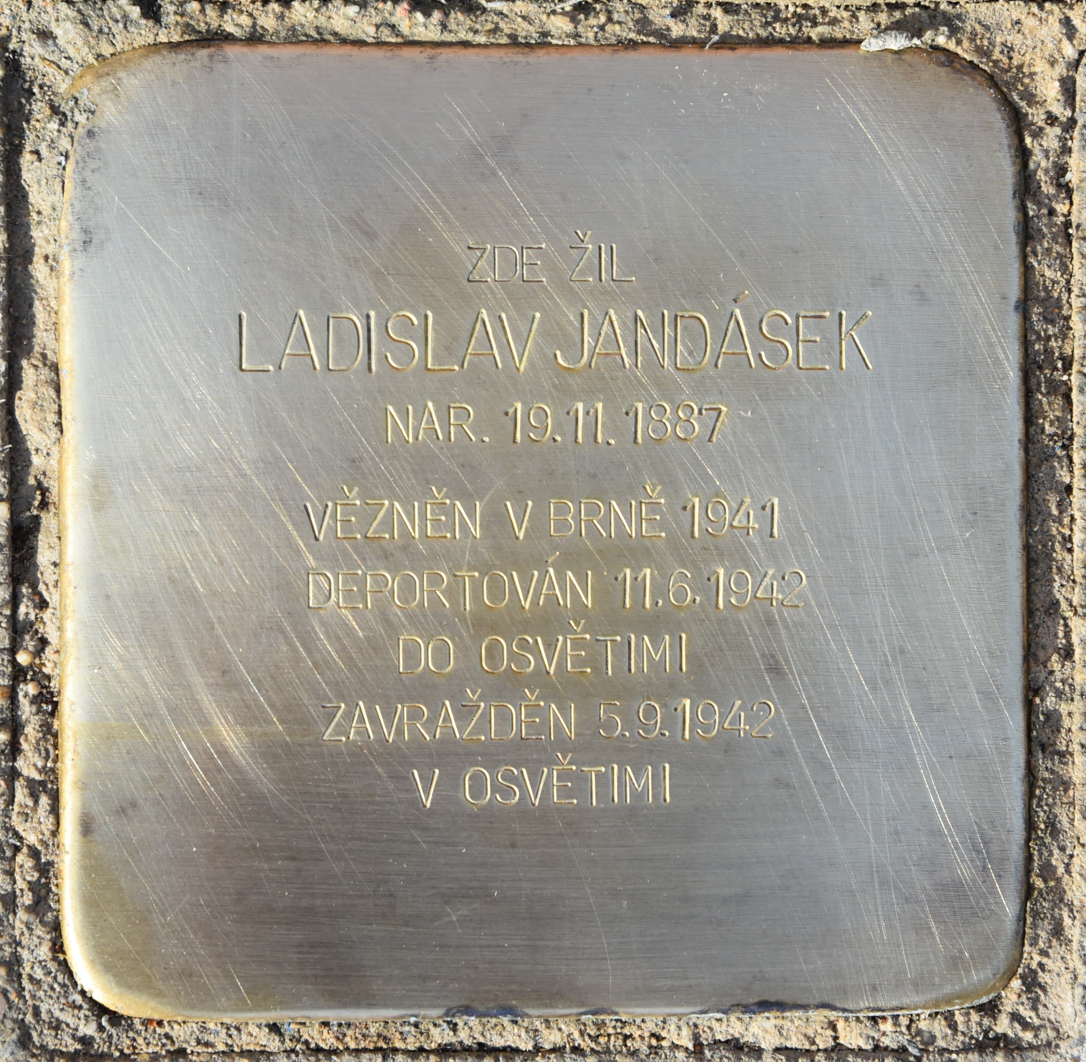 Gedenkstein für Ladislav Jandasek